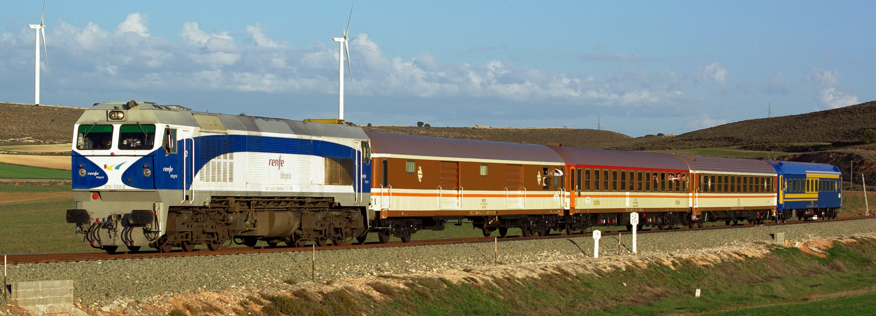 Convoy especial Madrid-Soria con una 319.3 al frente y coches RENFE en varias libreas.